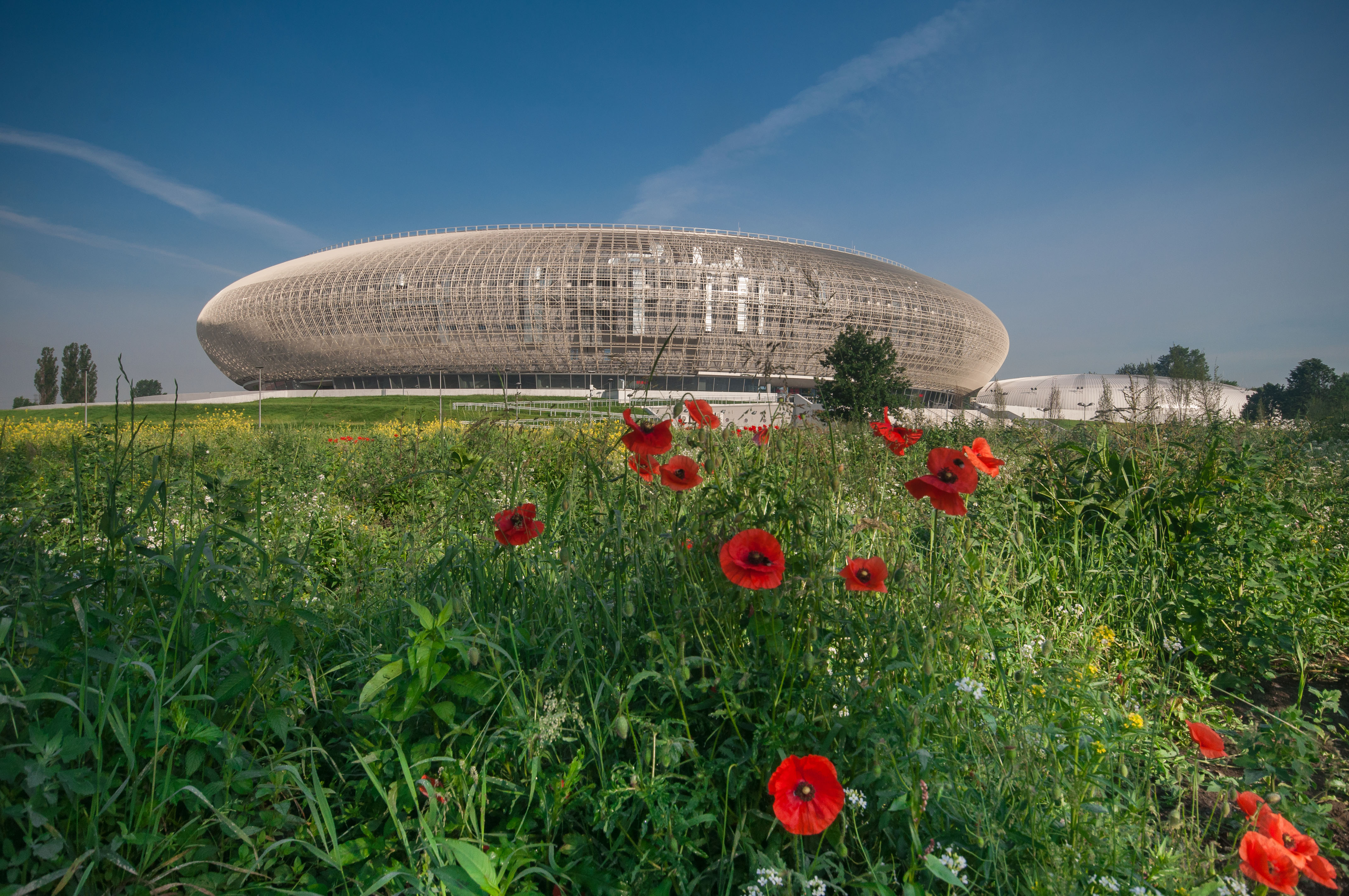 Kraków Arena – wielofunkcyjna hala widowiskowo-sportowa w Krakowie w dzielnicy Czyżyny, przy nowo powstałej ulicy Stanisława Lema.